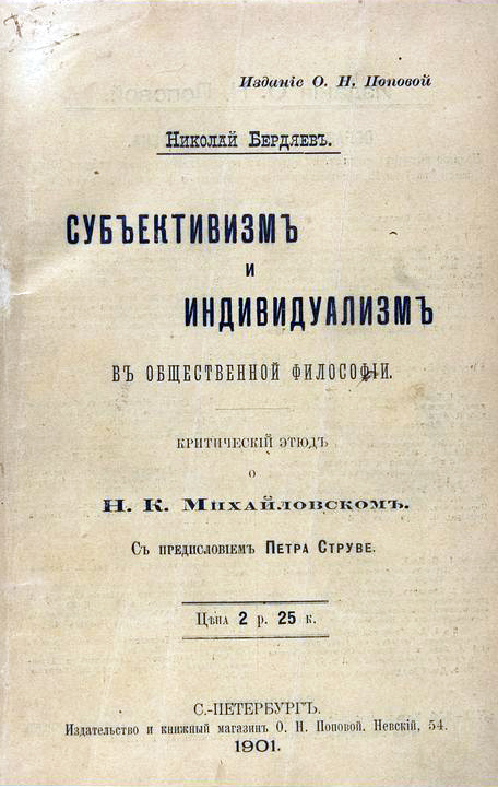 Бердяев, Н.А. Субъективизм и индивидуализм в общественной философии: Критический этюд о Н.К. Михайловском. С предисловием П. Струве. СПб.: О.Н. Поповой, 1901. [2], LXXXIV, IV, 267, III, II с.; 203х140 мм